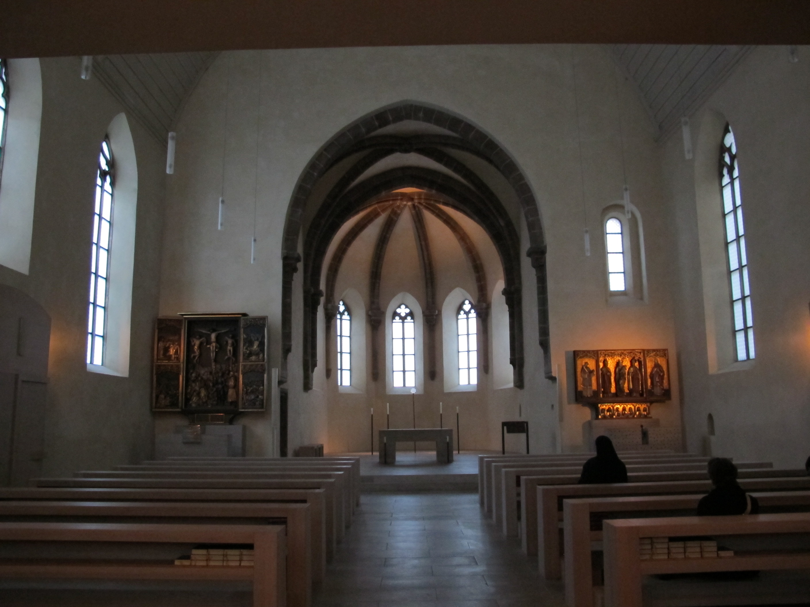 Klarakirche (Nuremberg), interior